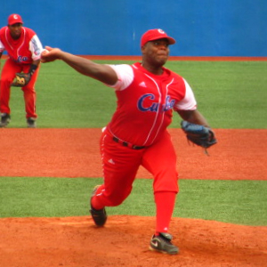 Yadier Pedroso